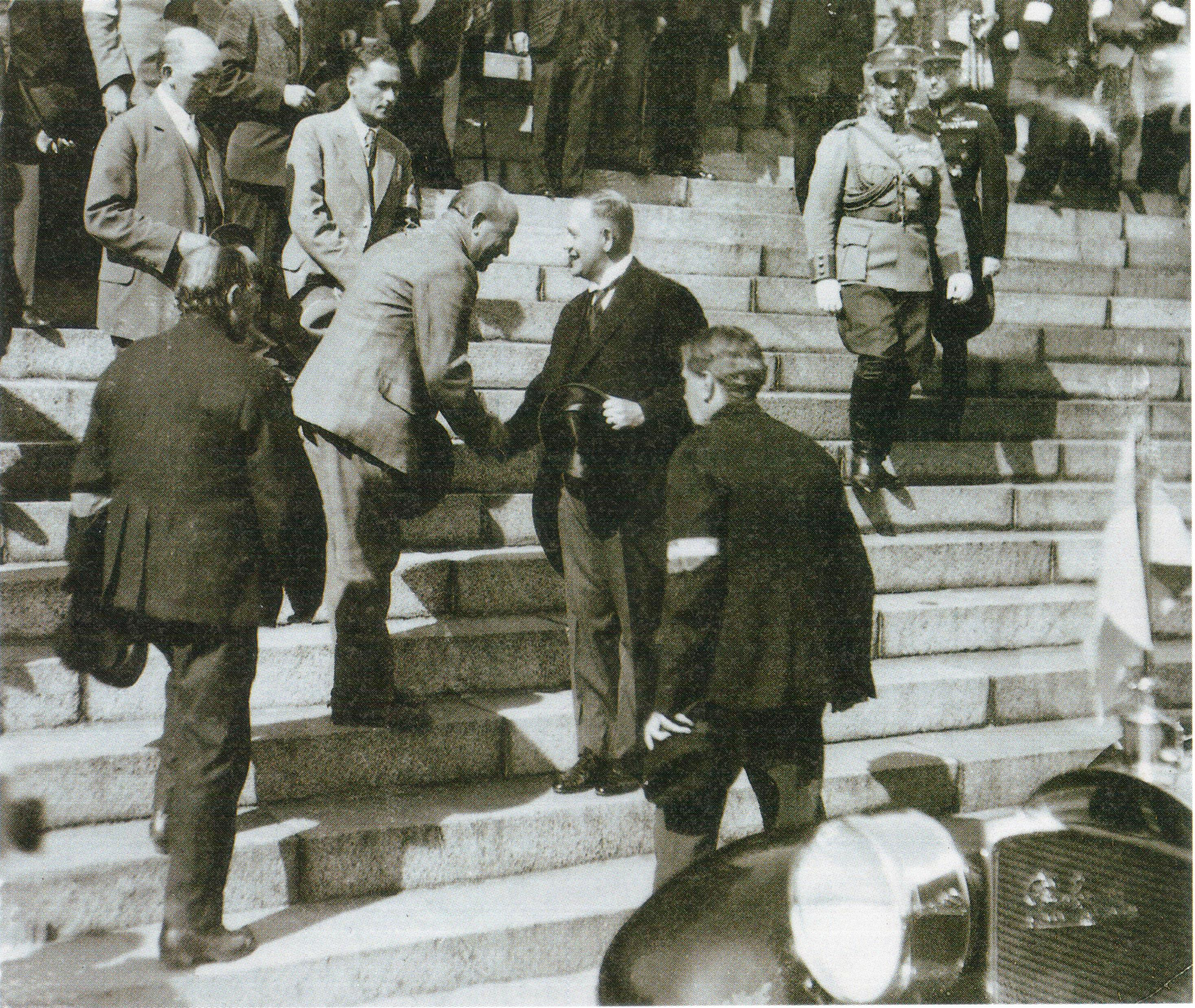 Presidentti Relander kättelee Vihtori Kosolaa talonpoikaismarssin jälkeen Helsingin tuomiokirkon portailla.